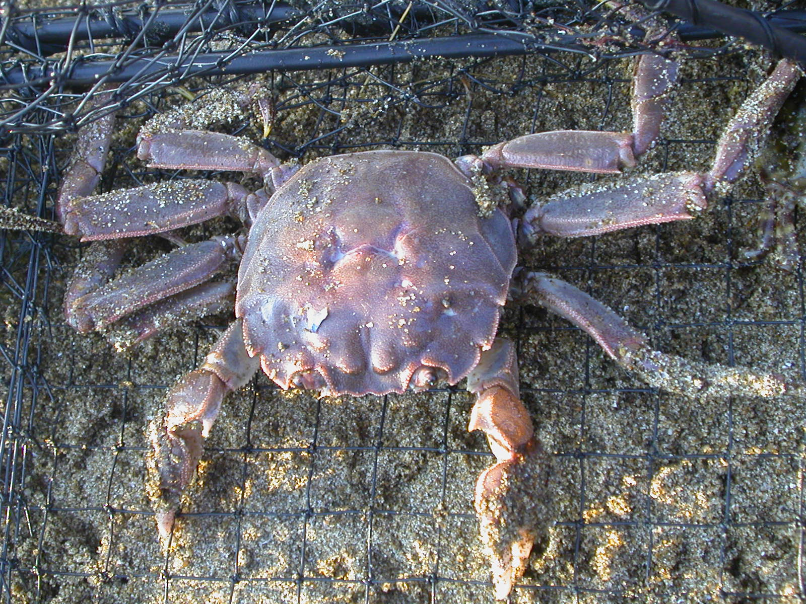 Eriocheir japonica(mitten crab,モクズガニ)千葉県千葉市